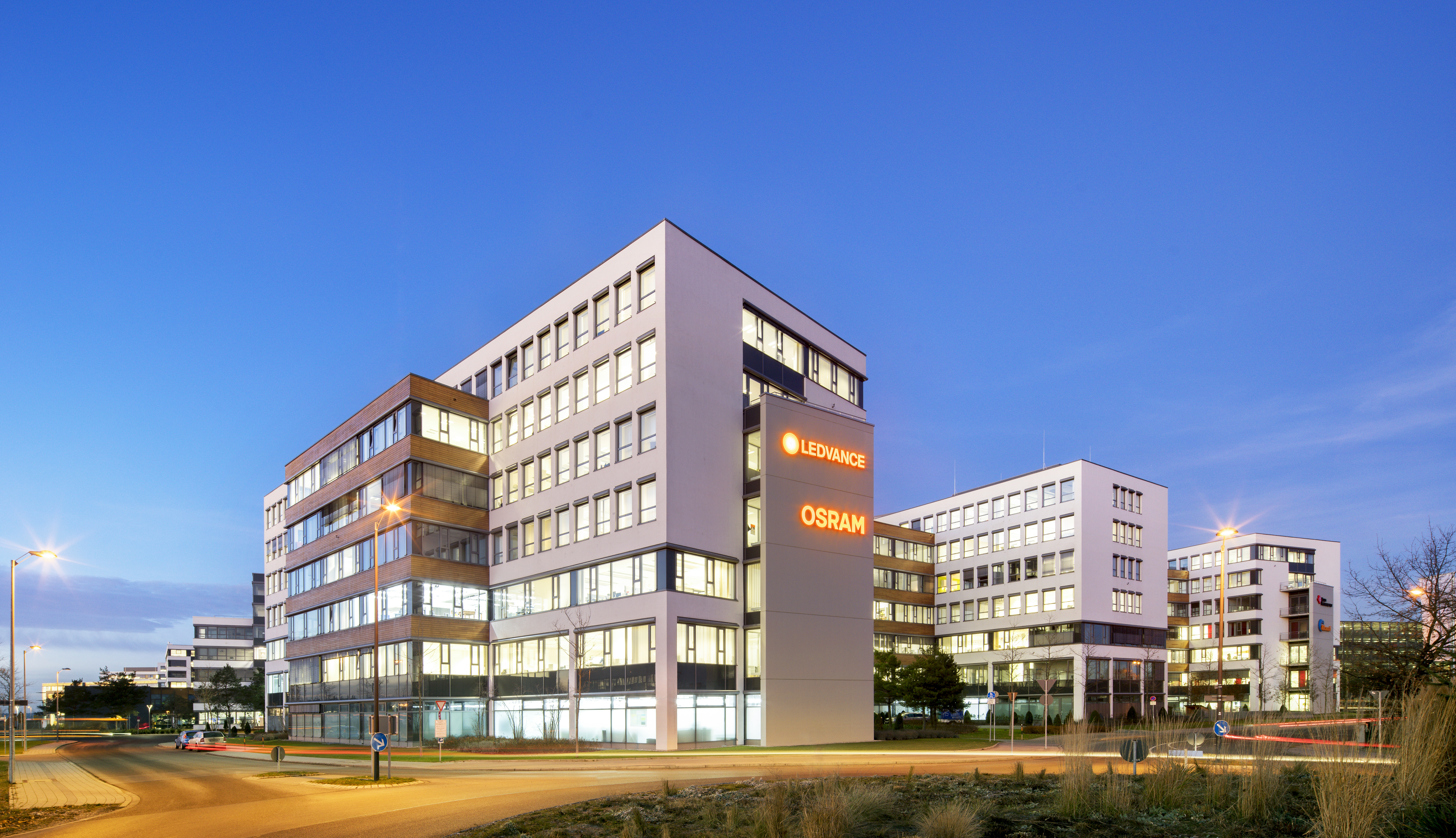 Ledvance Headquarter in Garching